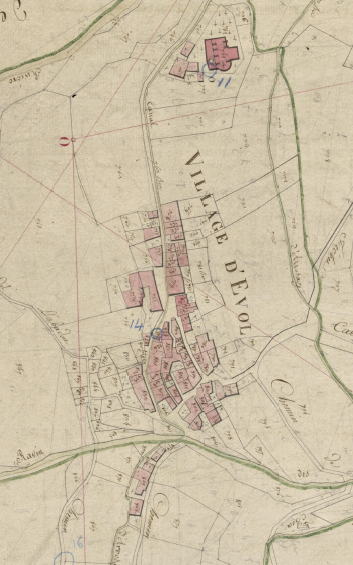 Èvol en el Cadastre napoleònic del 1812 (Arxius Departamentals dels Pirineus Orientals)